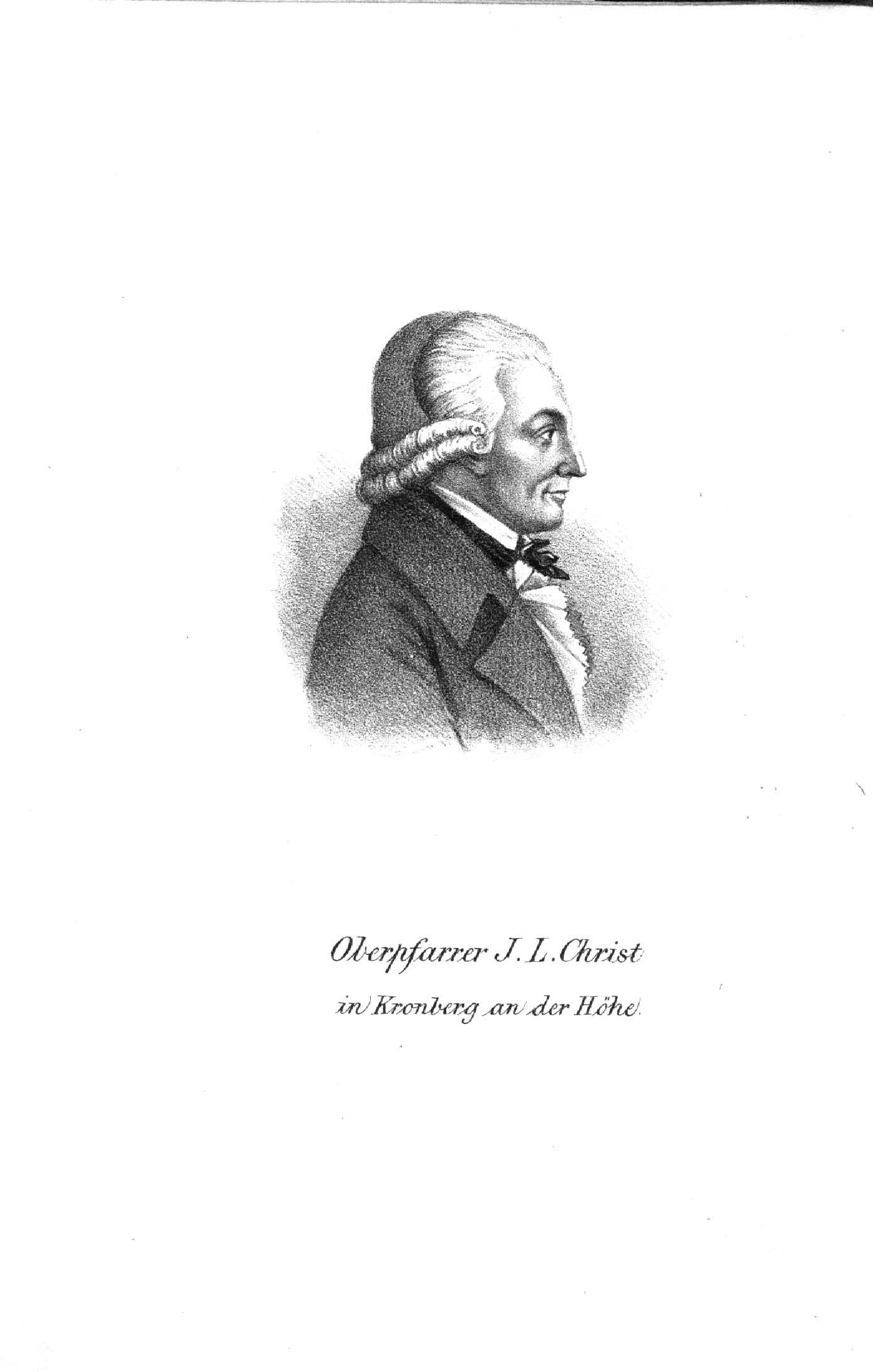 Johann Ludwig Christ, Porträt, Bildunterschrift: Oberpfarrer J. L. Christ in Kronberg an der Höhe